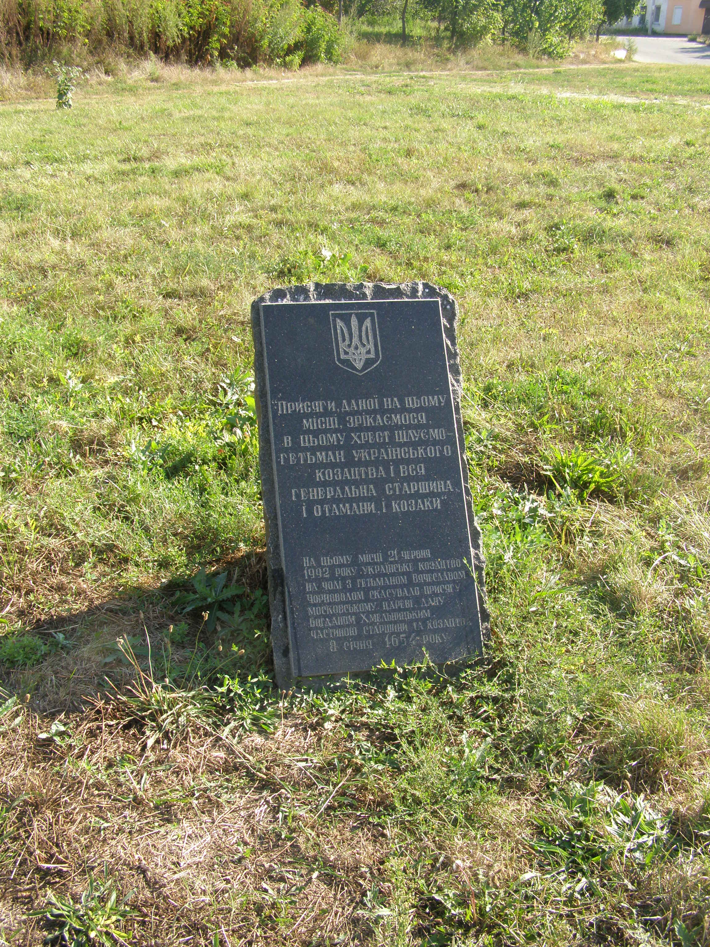 Пам'ятне місце, де відбувалася Переяславська рада, Переяслав-Хмельницький. Пам'ятний знак про зречення українського козацтва на чолі з гетьманом В'ячеславом Черноволом від присяги московському царю 21 червня 1992